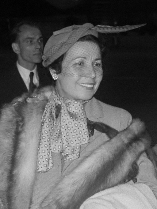 Aankomst zangeres Elena Nicolaidi 24 augustus 1953